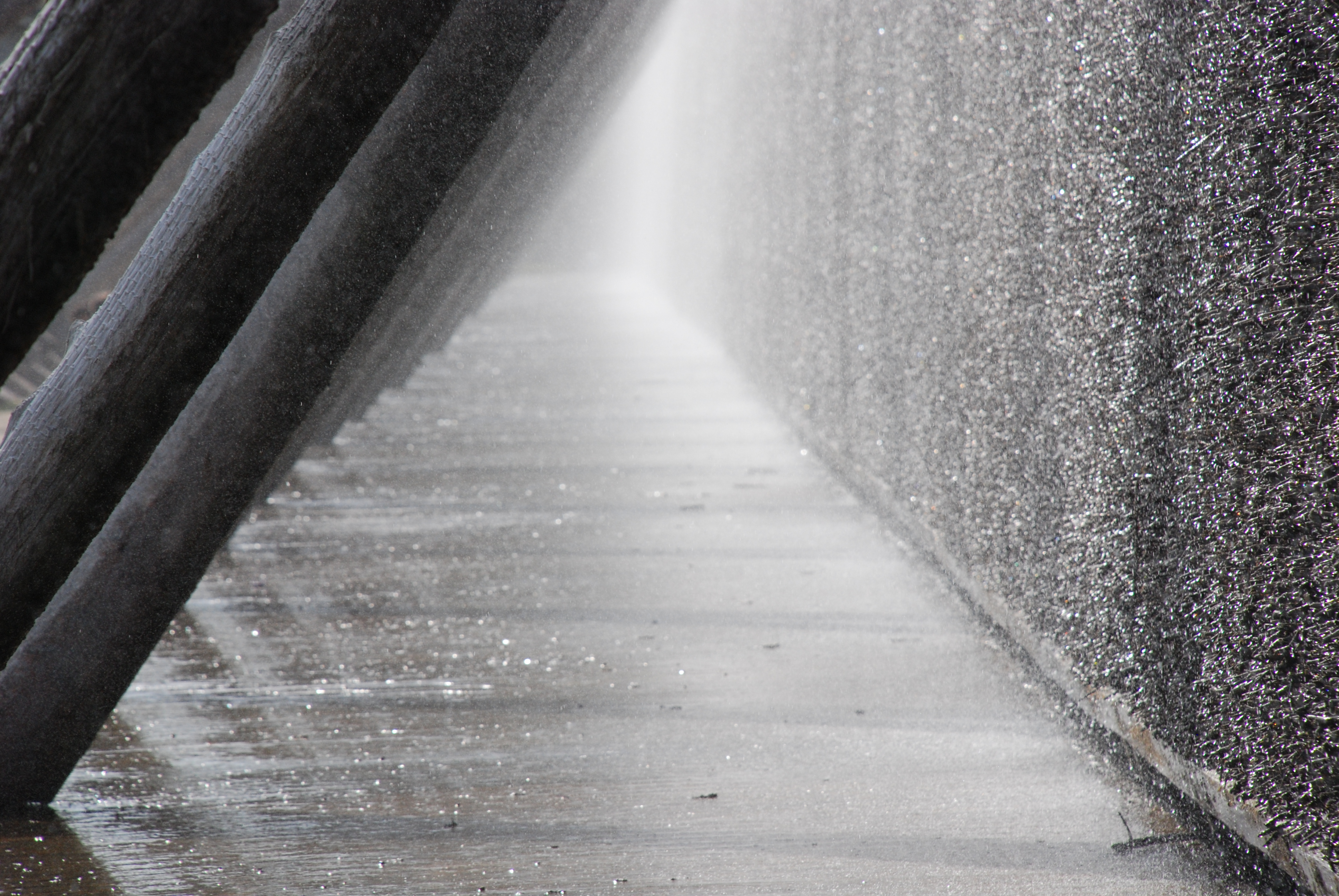 Aerozole powstałe w wyniku działania tężni